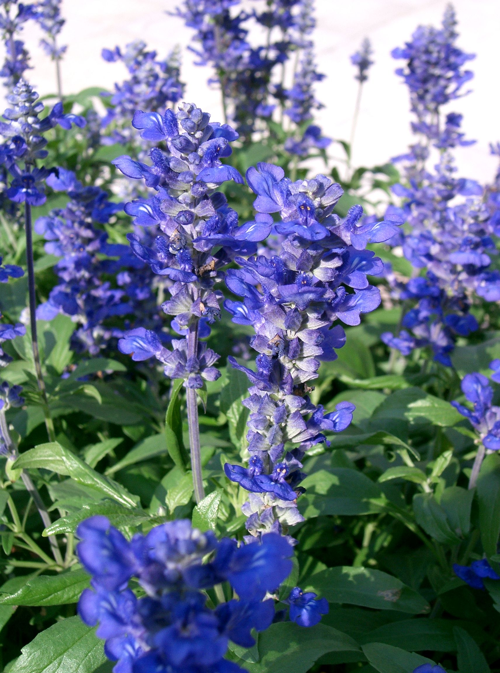 Salvia farinacea